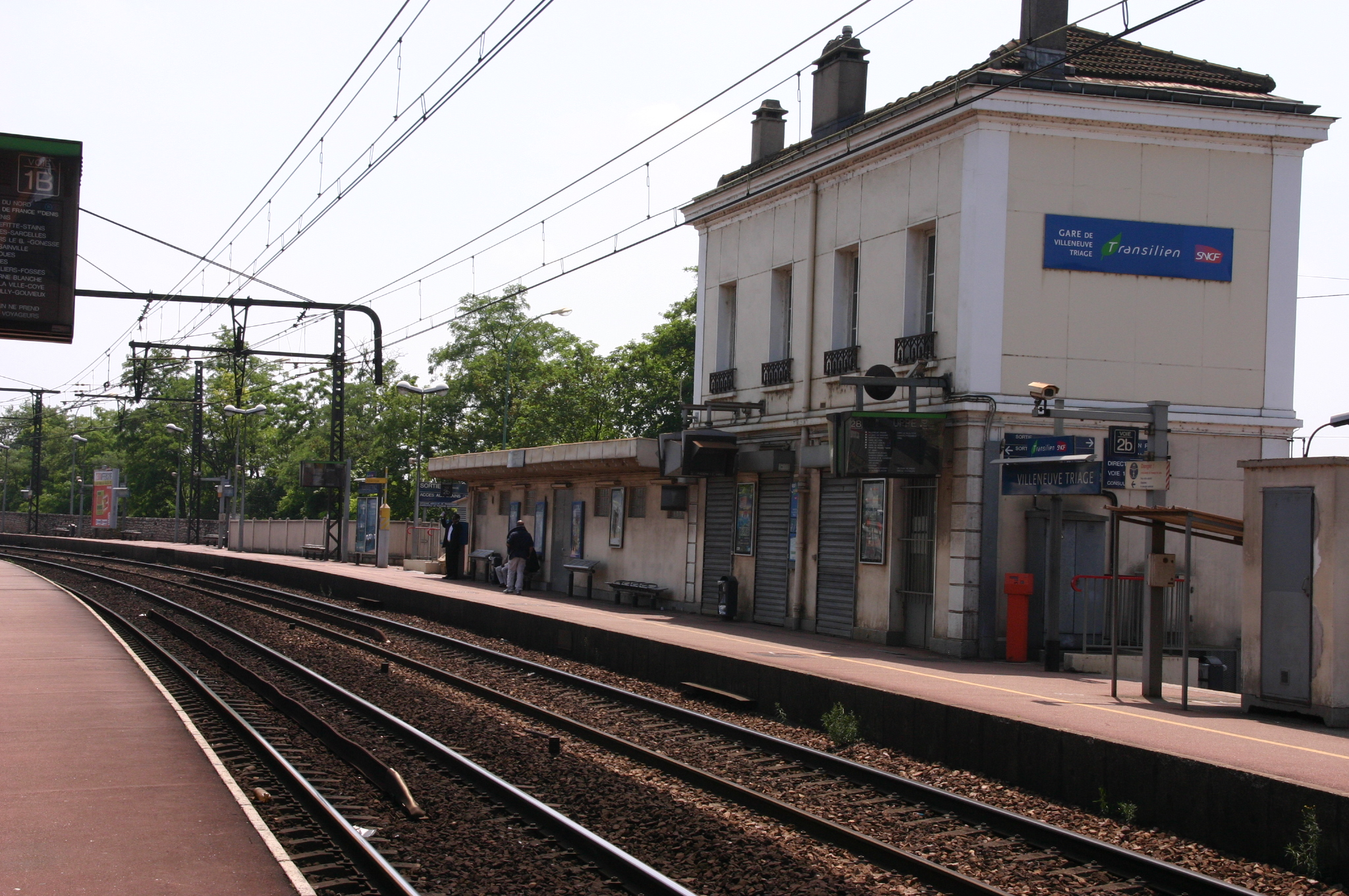 La gare de Villeneuve-Triage, Villeneuve-Saint-Georges, département du Val-de-Marne, France